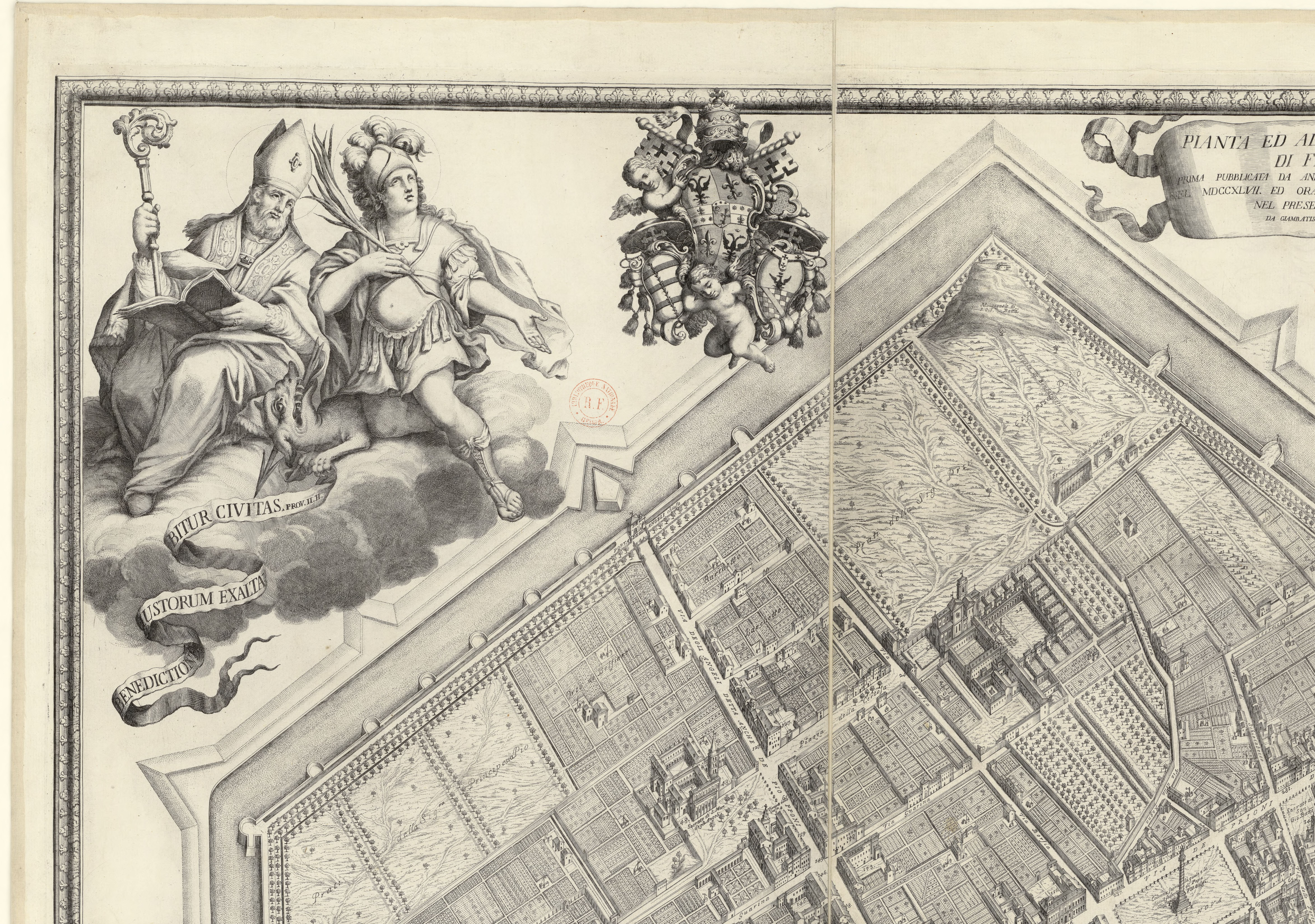 Pianta ed alzato della città di Ferrara, prima pubblicata da Andrea Bolzoni,... nel M D CC XLVII, ed ora ridotta secondo il suo stato nel presente anno M D CCLXXXII da Giambattista Galli